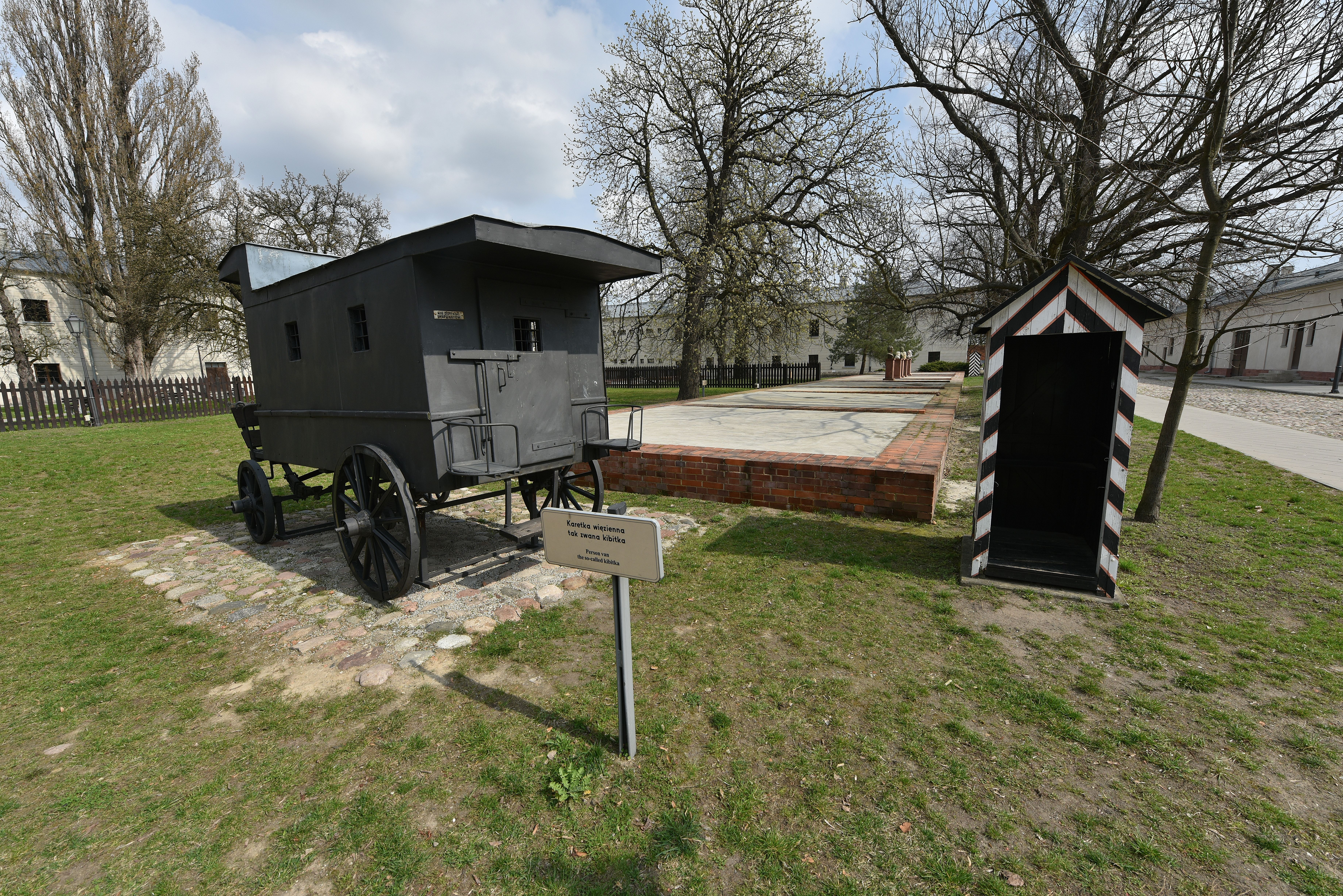 Cytadela Warszawska